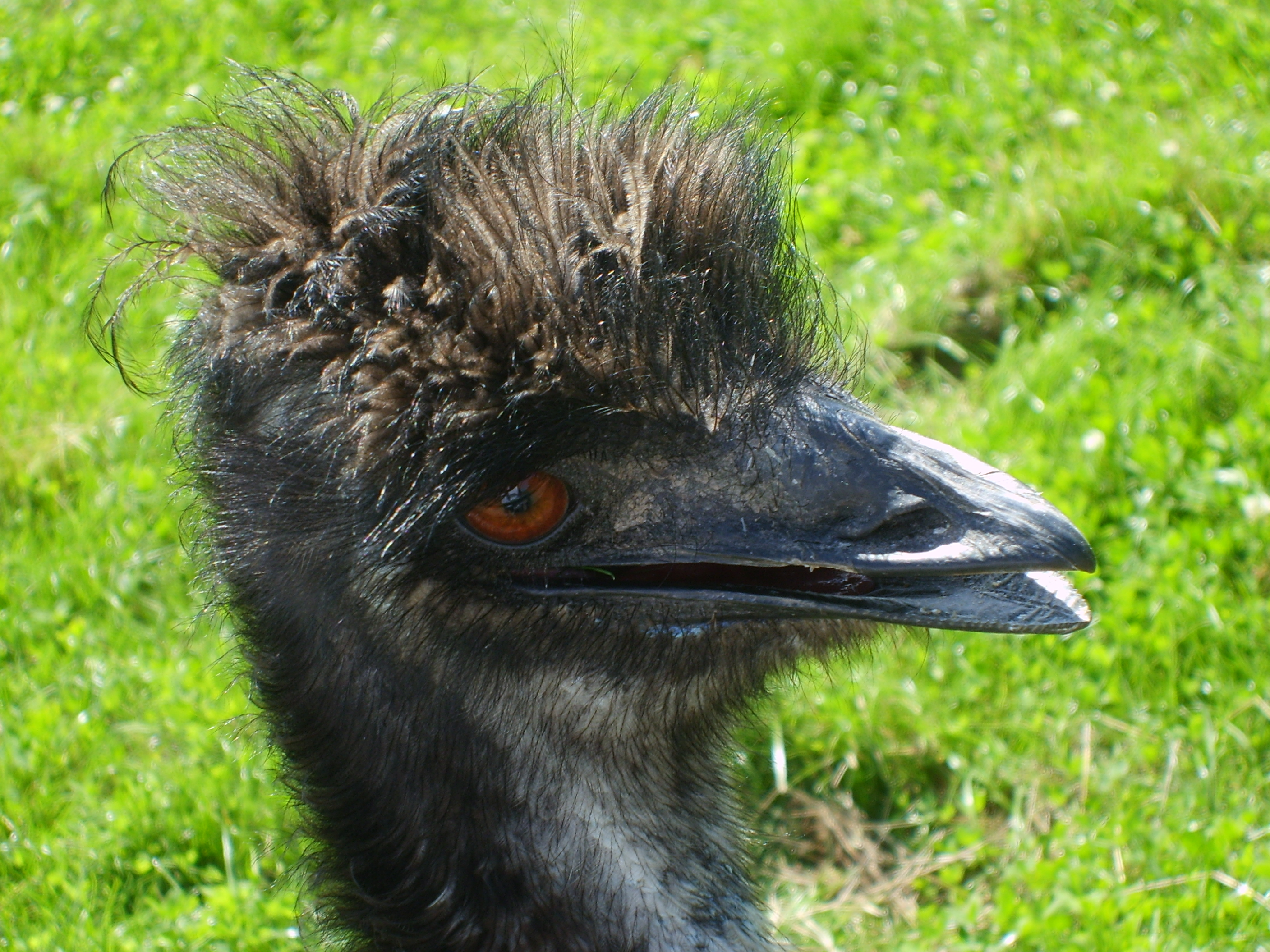 Emu head, zoo in Odsherred Zoo in Denmark.